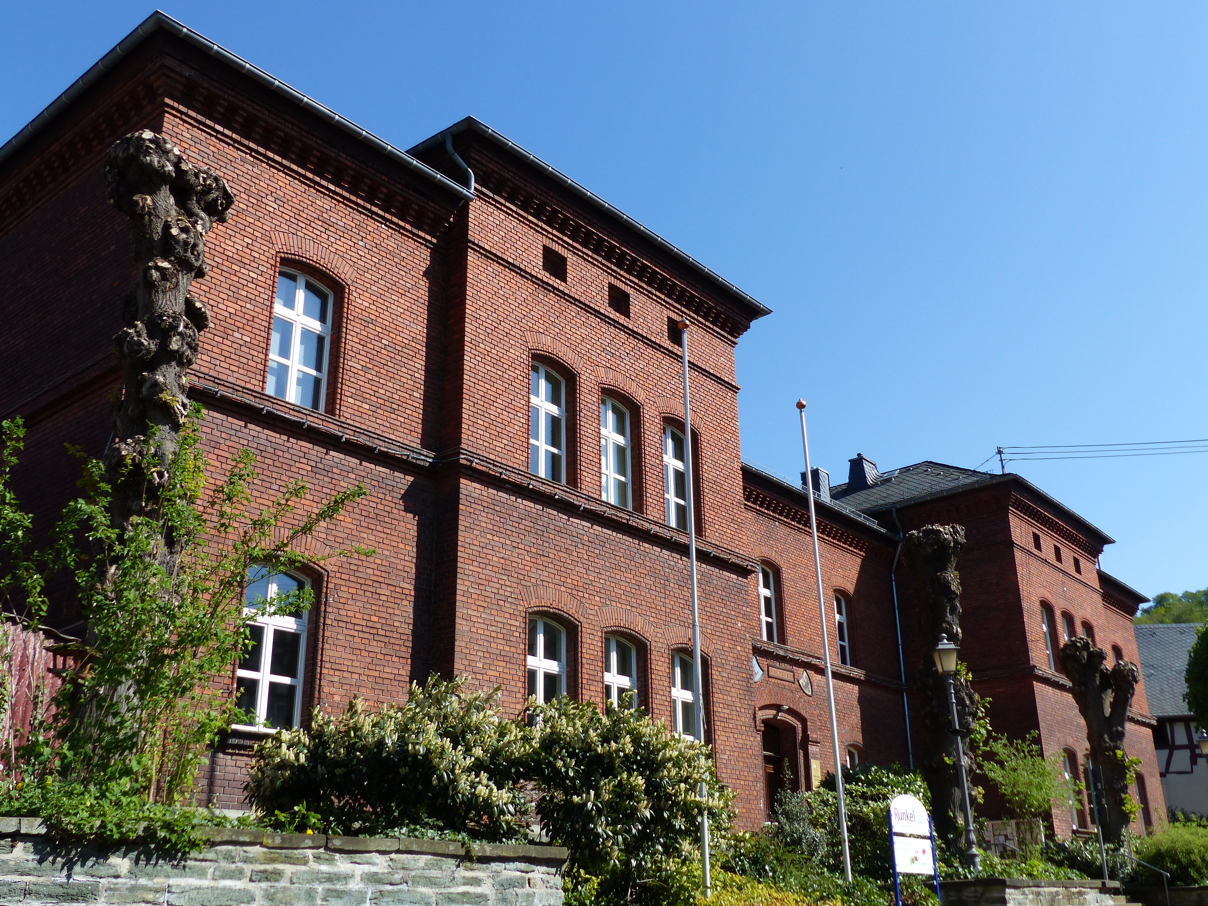 Runkel: Ehemaliges Amtsgericht, heutiges Rathaus